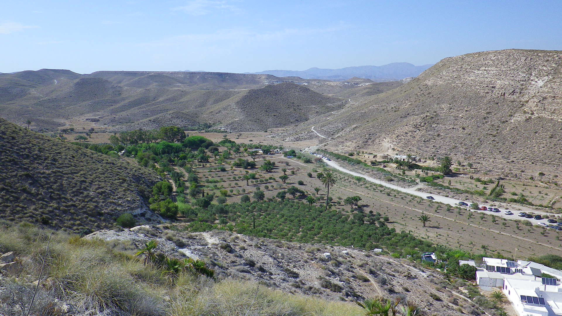 Vista de la Rambla del Plomo y el Cortijo de la Huerta de Enmedio.